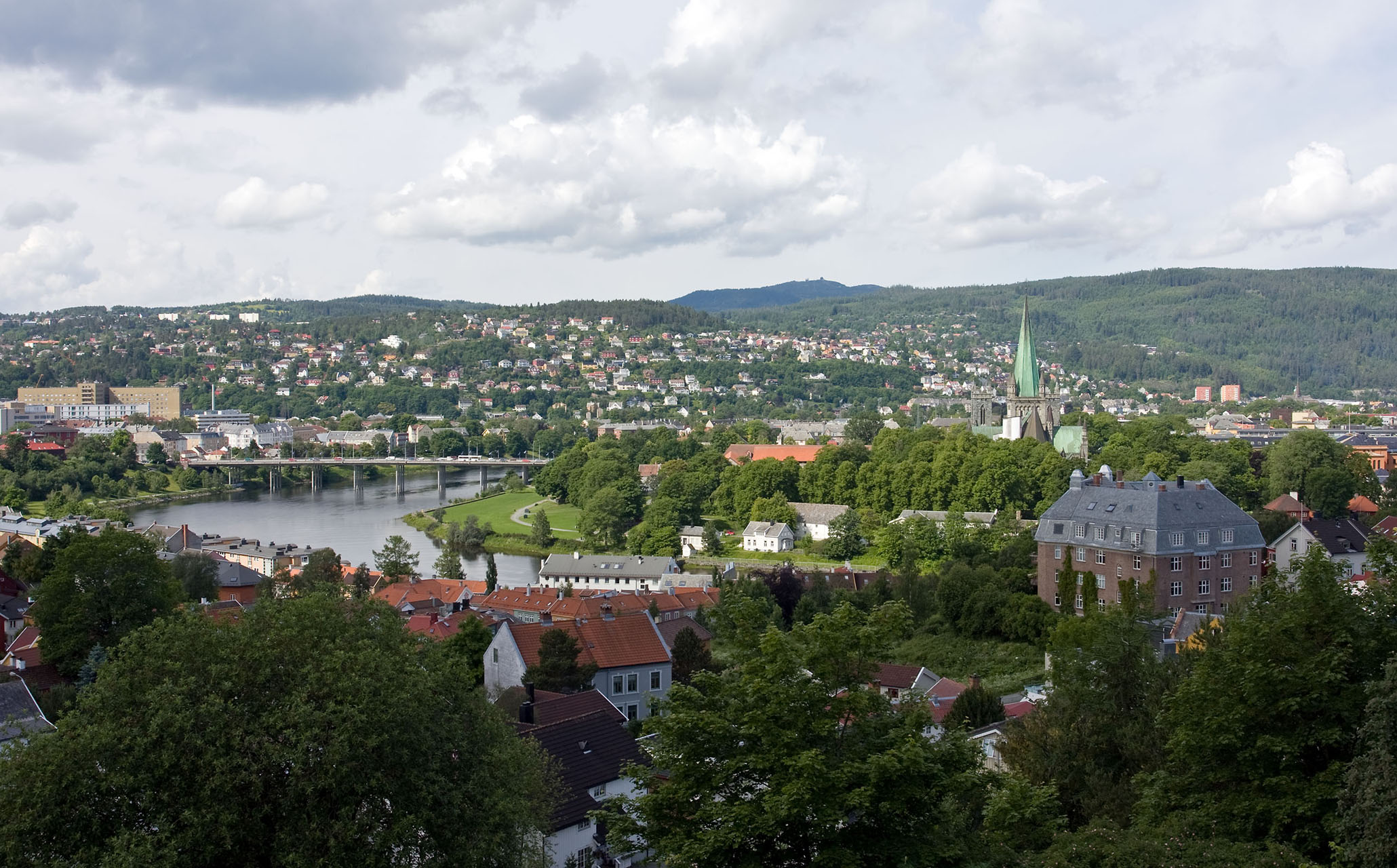 View from Kristiansten Fortress / Trondheim, Norway